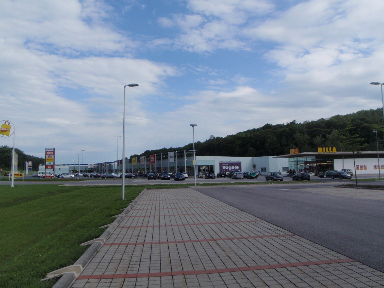 Stoob süd Shopping Center